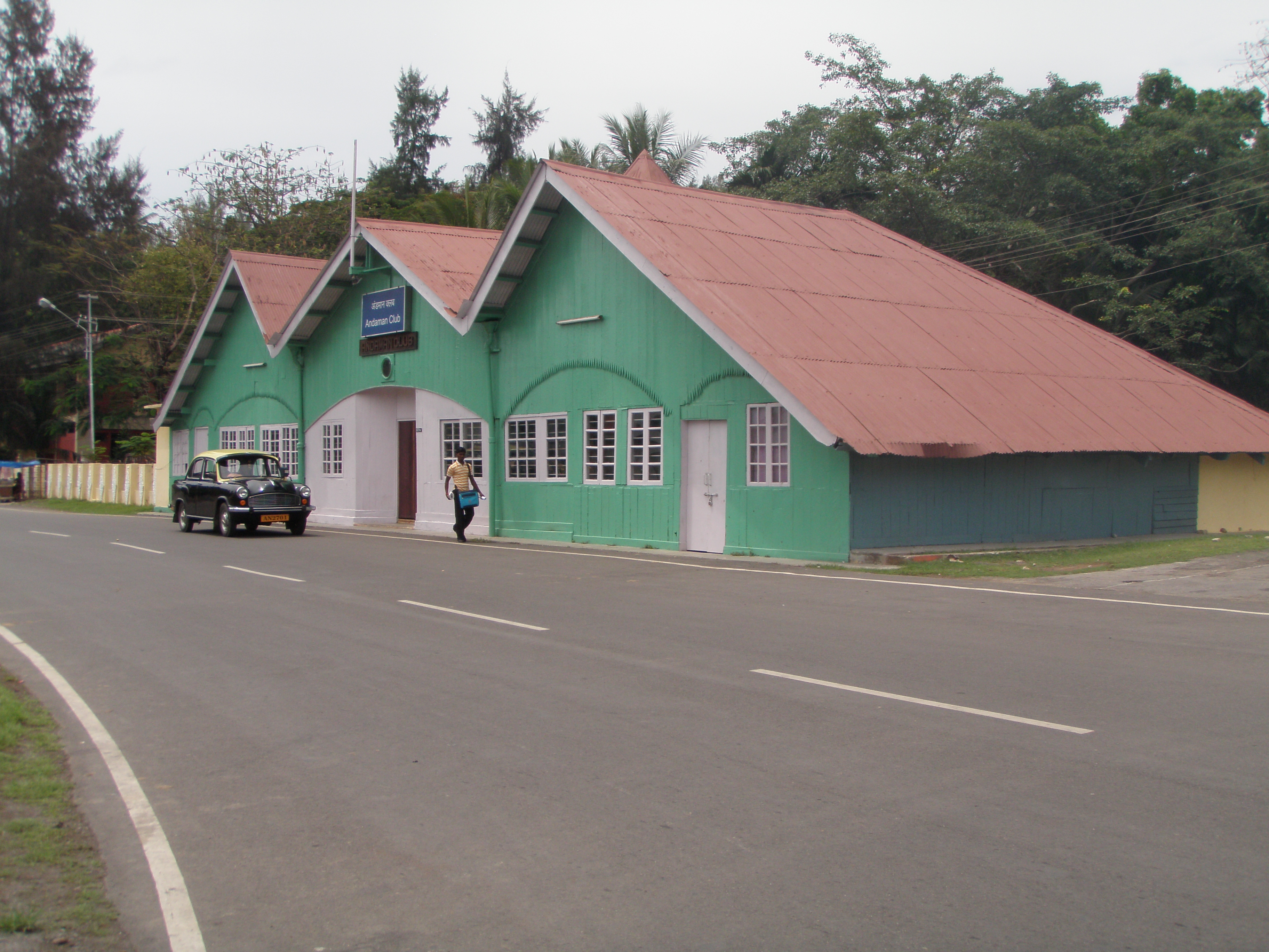 Andaman Club, Port Blair, India.